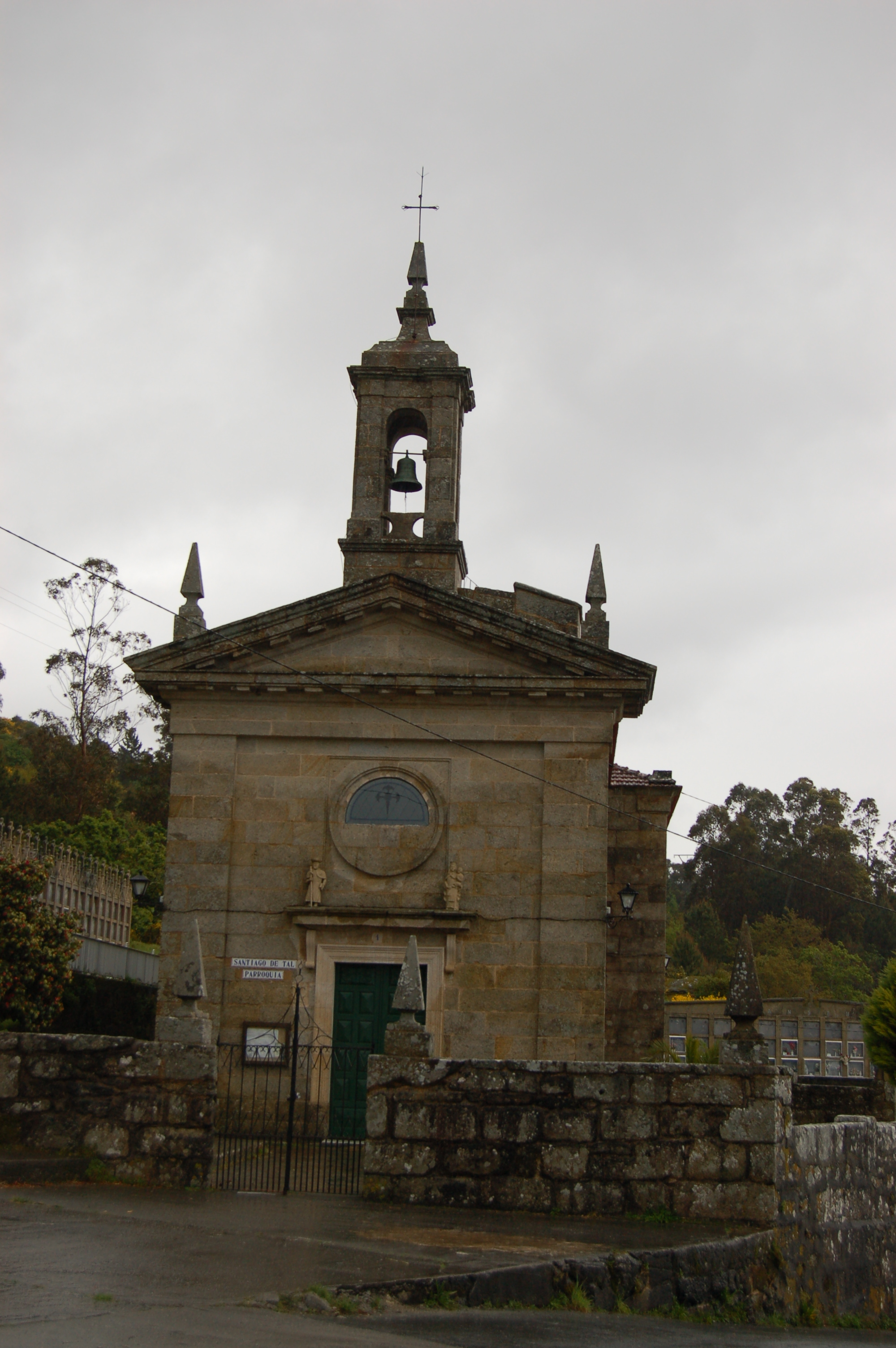 Igrexa parroquial de Santiago de Tal (Muros).